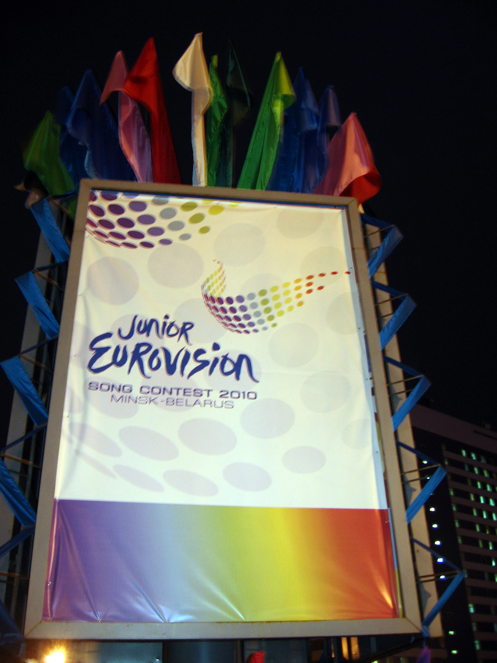 Рекламный щит перед Минск-Арена